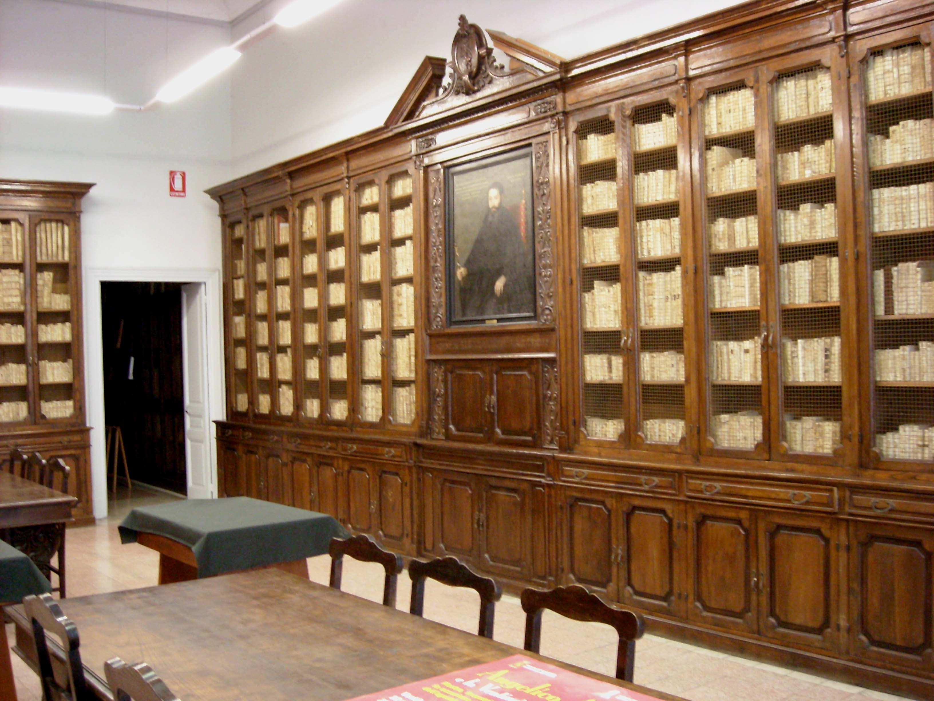 Biblioteca Aprosiana ha sede definitive nel ex Teatro Civico in via Garibaldi, nel sestiere della città medieovale di Ventimiglia, Italia.